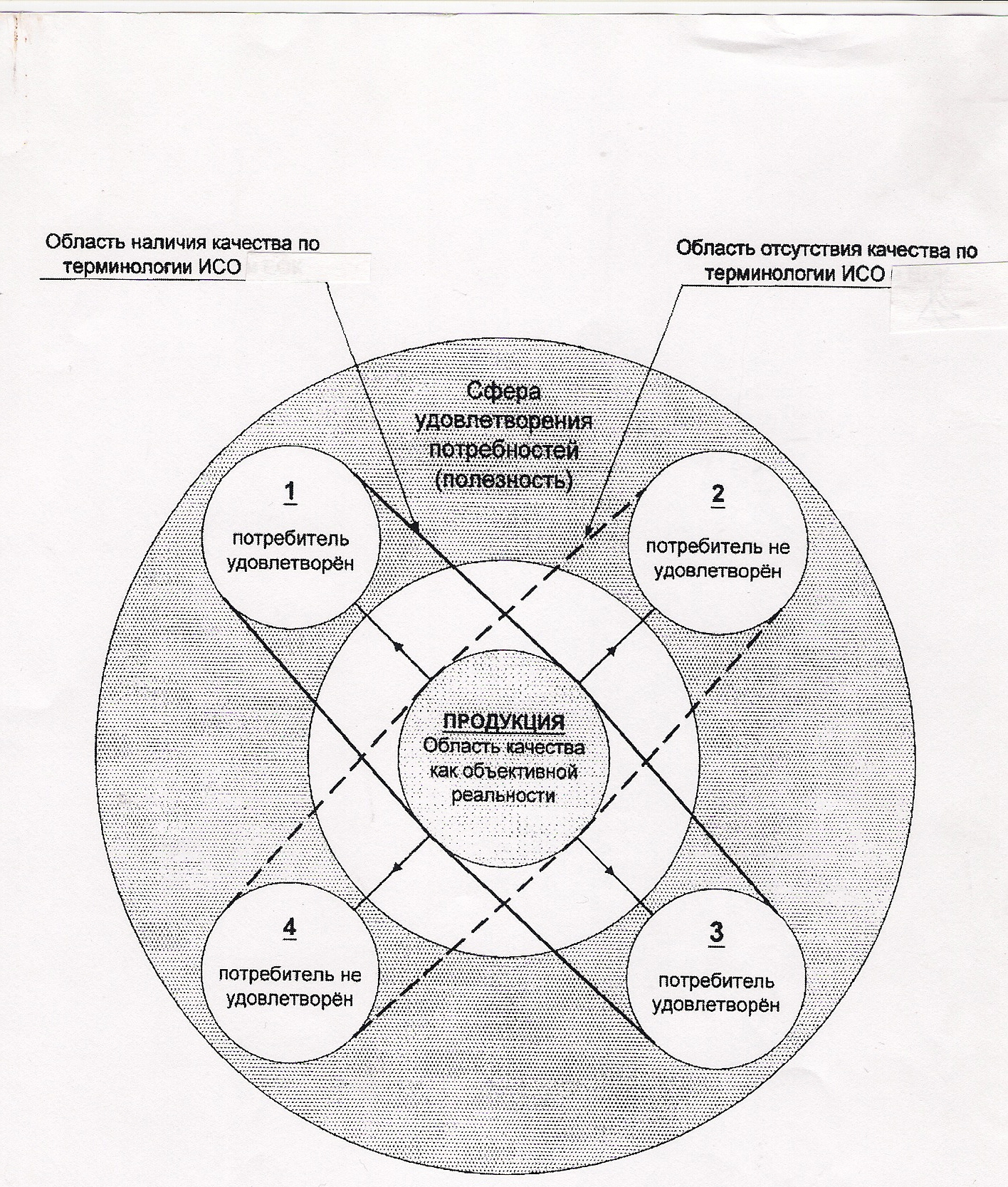 Рисунок наглядно показывает соотношение качества и полезности продукции, чтобы исключить ошибки, когда вместо качества говорят о полезности.